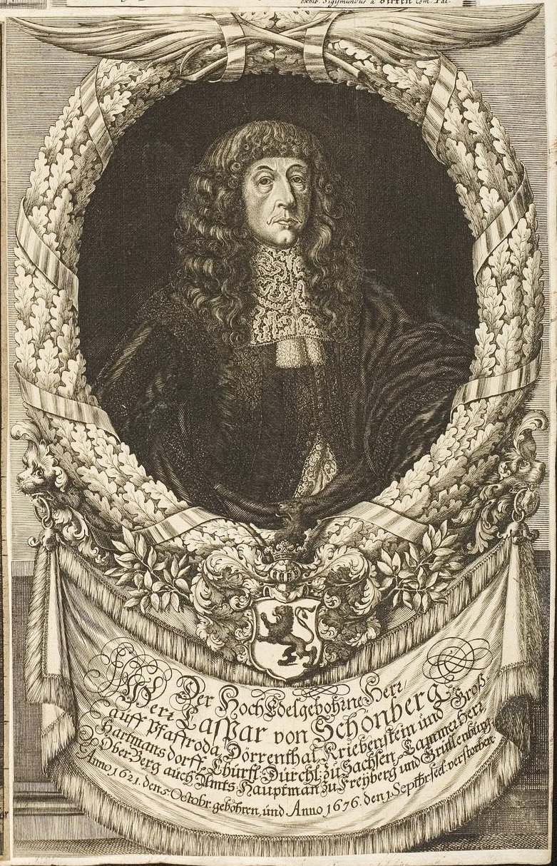 Grafik aus dem Klebeband Nr. 1 der Fürstlich Waldeckschen Hofbibliothek Arolsen Motiv: Caspar von Schönberg (1621–1676), Oberberg- und Amtshauptmann in Freiberg GND: 121592030